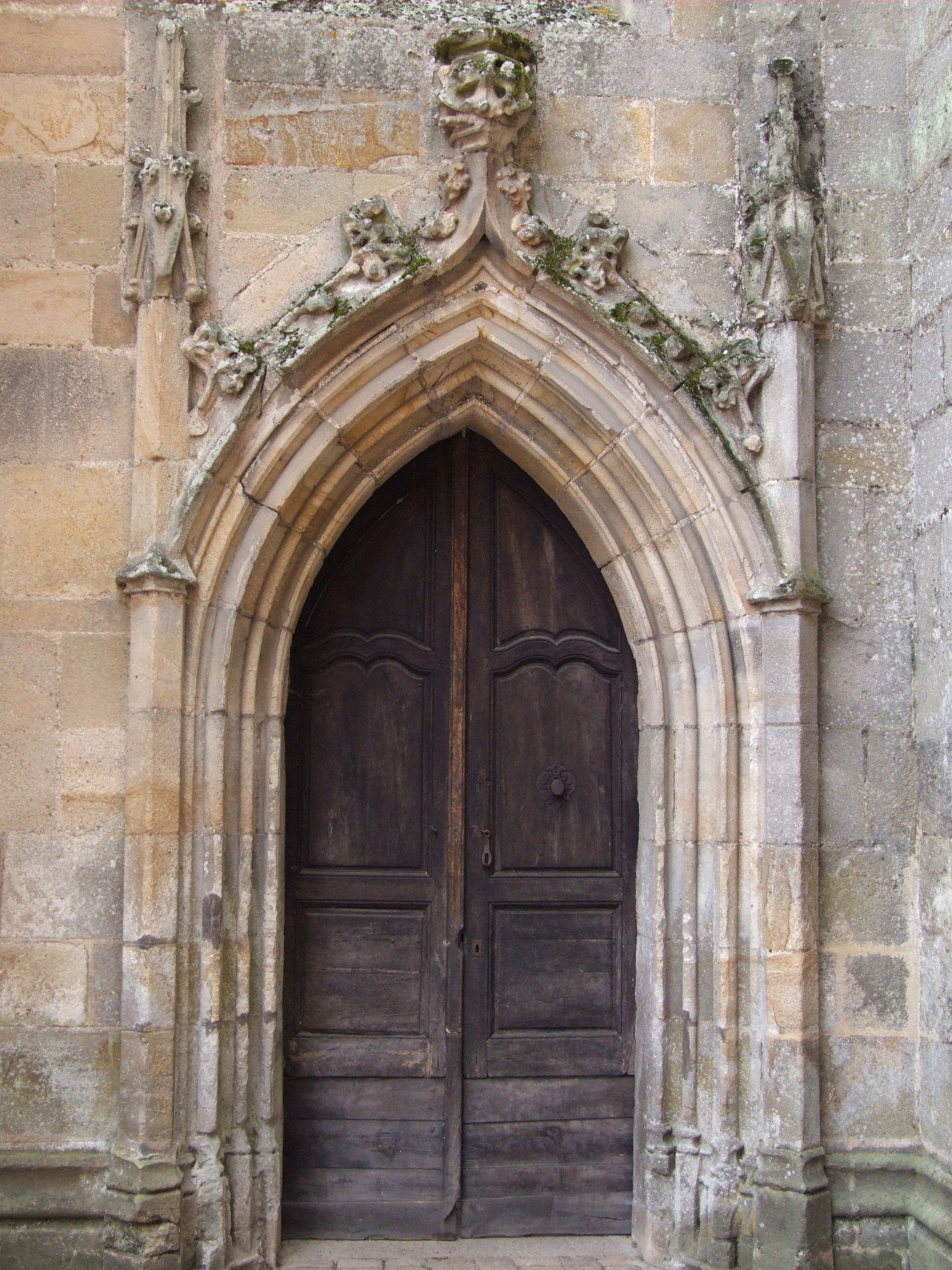 Lapalisse - Château de La Palice - Chapelle Saint-Léger - Porte de la chapelle côté ville